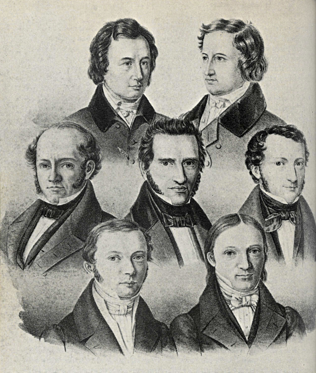 Die Göttinger Sieben, Lithografie von Eduard Ritmüller, 1837/38 The "Göttingen Seven", lithograph by Eduard Ritmüller, 1837/38 Wilhelm Grimm Jacob Grimm Wilhelm Eduard Albrecht Friedrich Christoph Dahlmann Georg Gottfried Gervinus Wilhelm Eduard Weber Heinrich Georg August Ewald